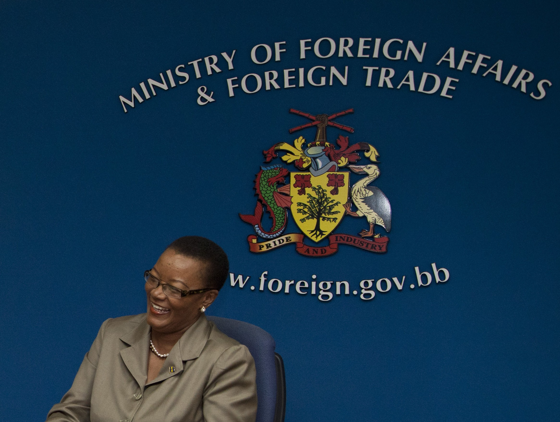 Bridgetown (Barbados), 18 de marzo de 2013. El Canciller Ricardo Patiño continúa su gira por el Caribe. En su visita a Barbados, se reunió con su homóloga de este país, Maxine McClean. Foto: Fernanda LeMarie - Cancillería del Ecuador.